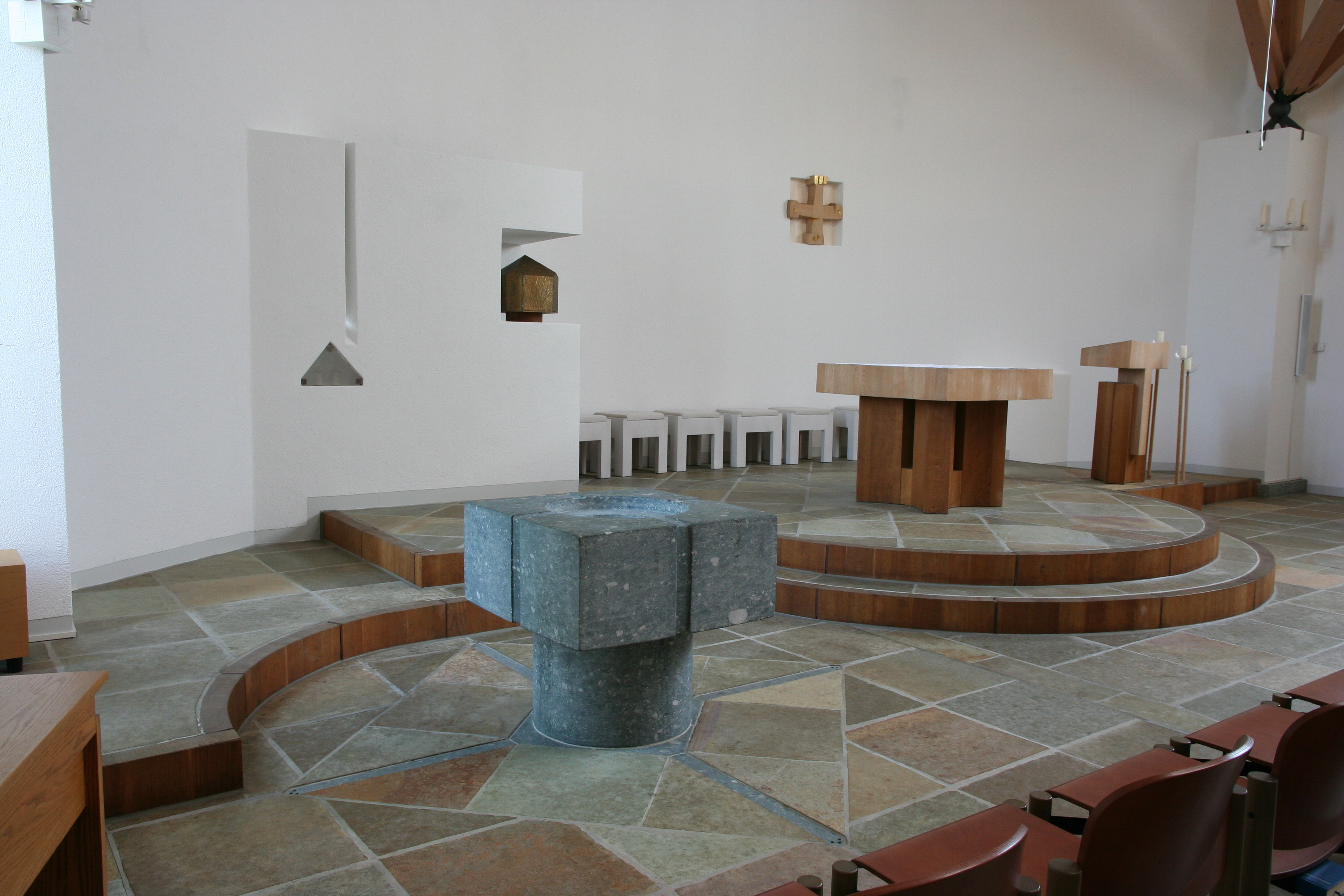 Römisch-katholische Pfarrkirche Maria Magdalena Rafz, Gestaltung von Alois Spichtig